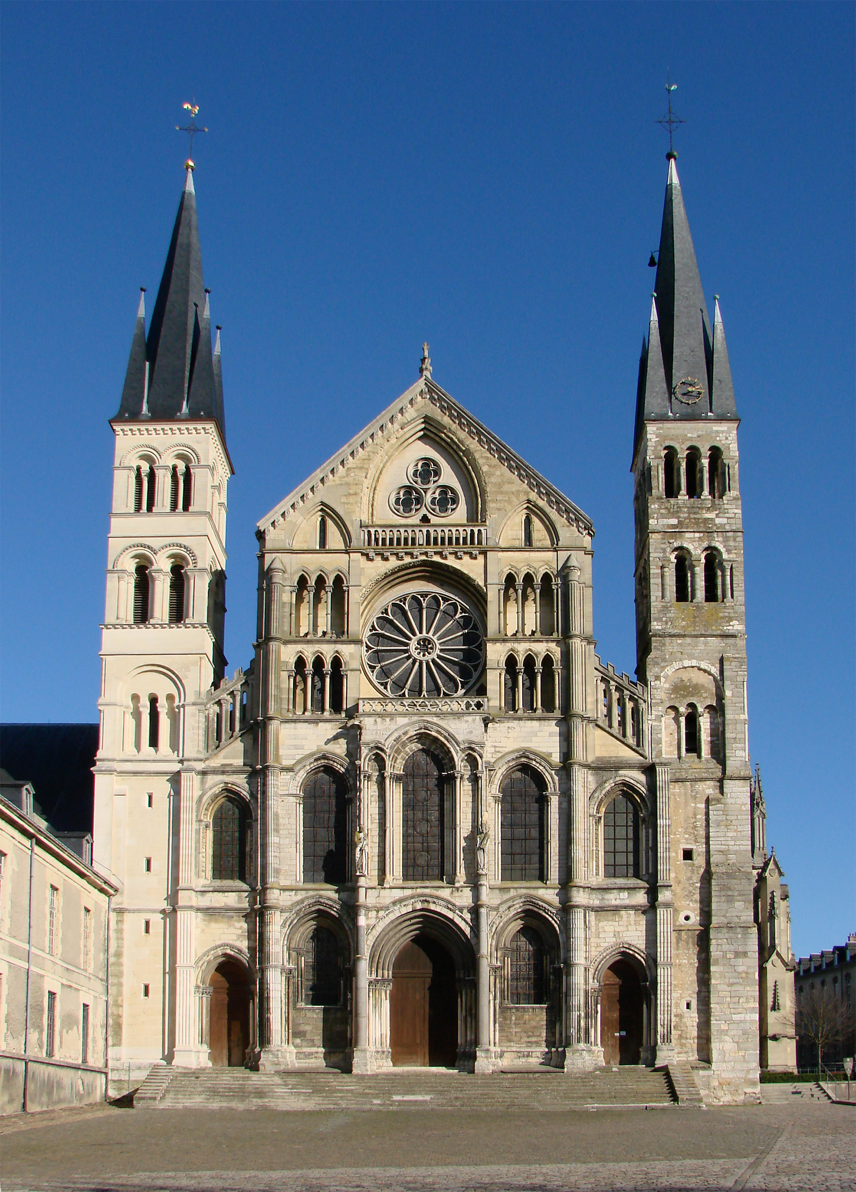 Façade de la basilique Saint-Remi à Reims. Les parties basses datent du 12ème siècle; la tour de droite remonte au 11ème siècle, celle de gauche a été construite au 19ème siècle ainsi que le pignon. Le portail est encadré par les statues de Saint Pierre et de Saint Remi, placées sur des colonnes gallo-romaines.